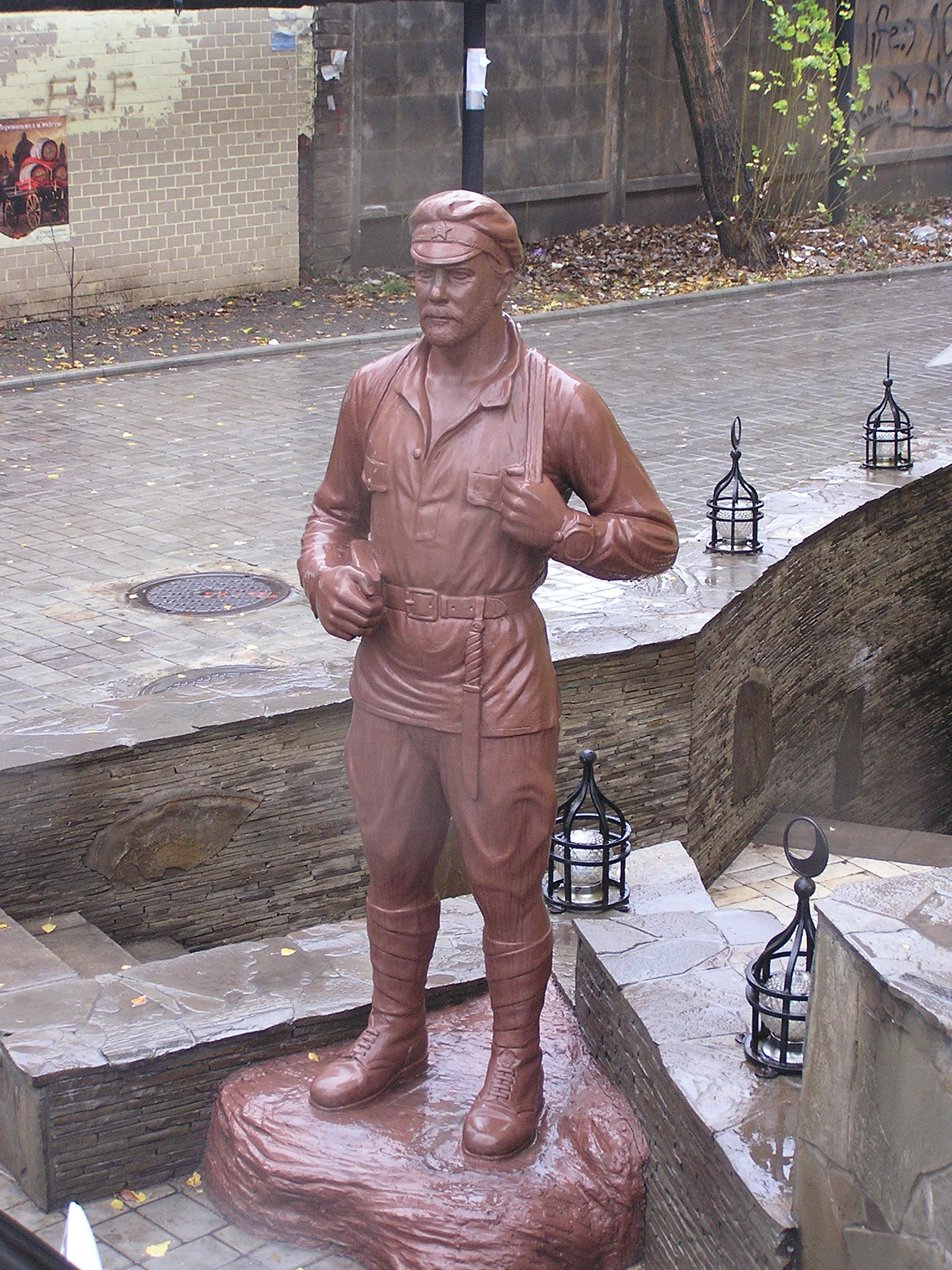 Донецк. Памятник Сухову